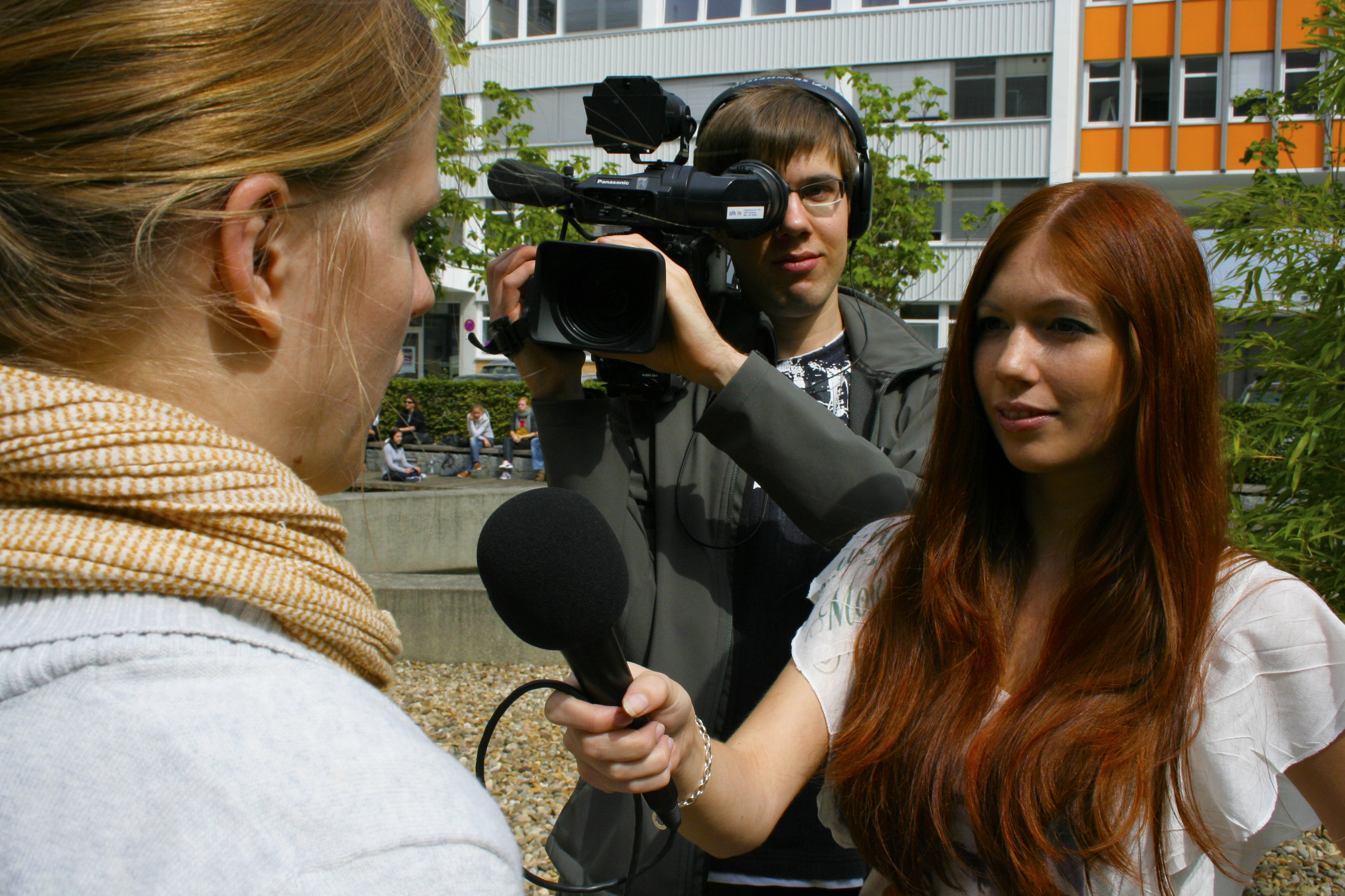 Vanessa führt ein Interview